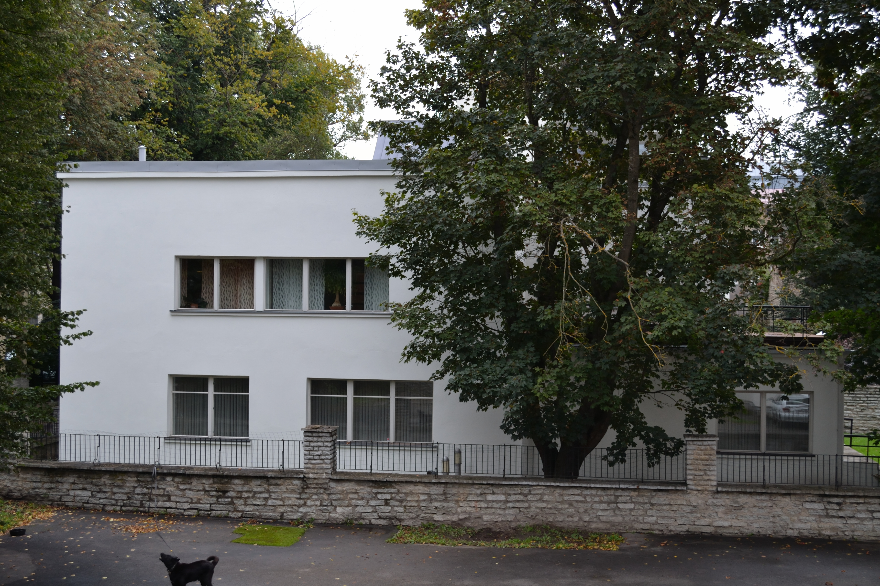 Tallinn, elamu Roosikrantsi 4b, 1931